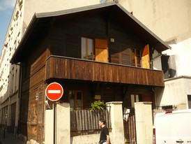 Chalet dans le 19ème arrondissement de Paris